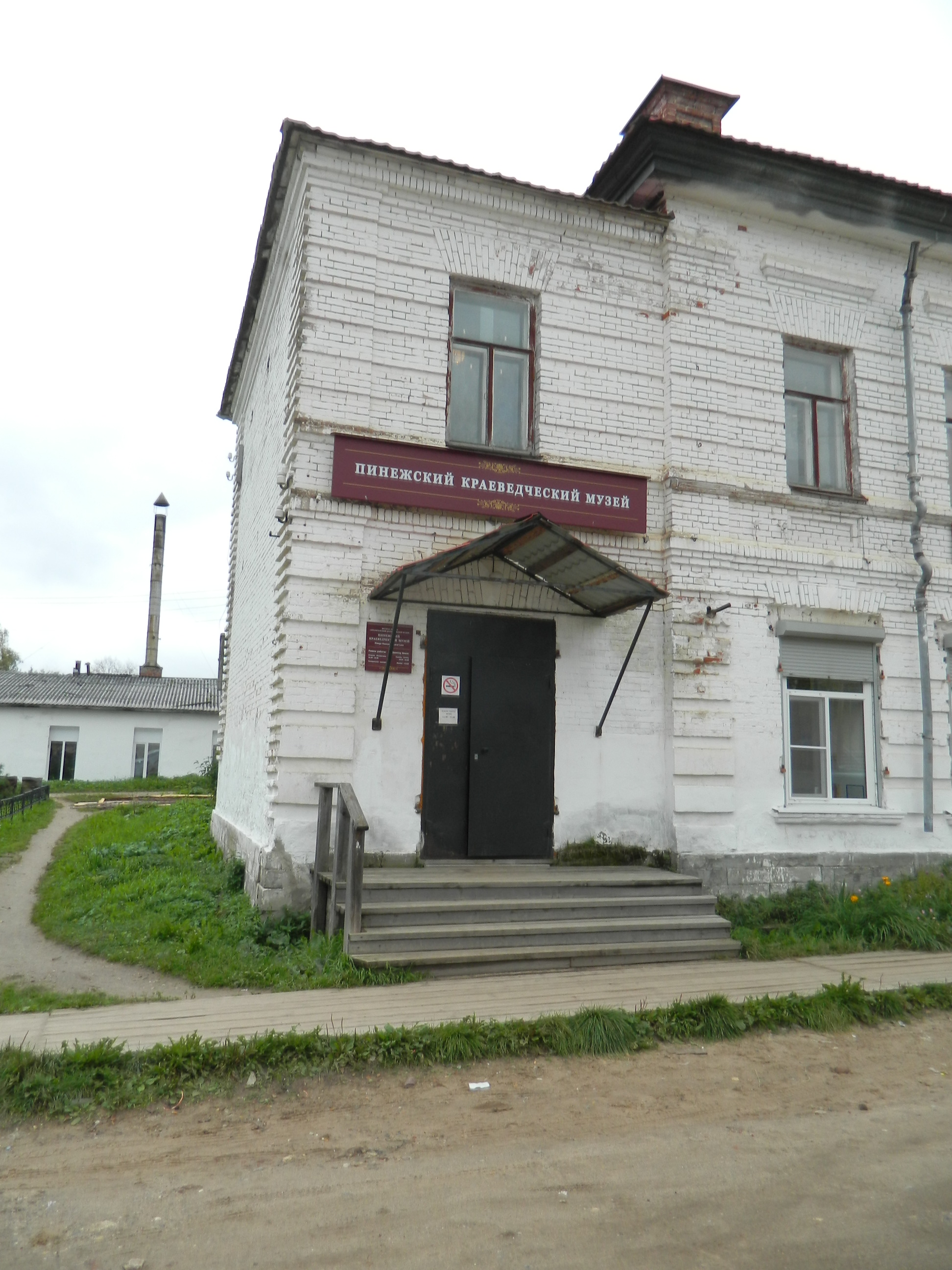 Здание музея в Пинеге